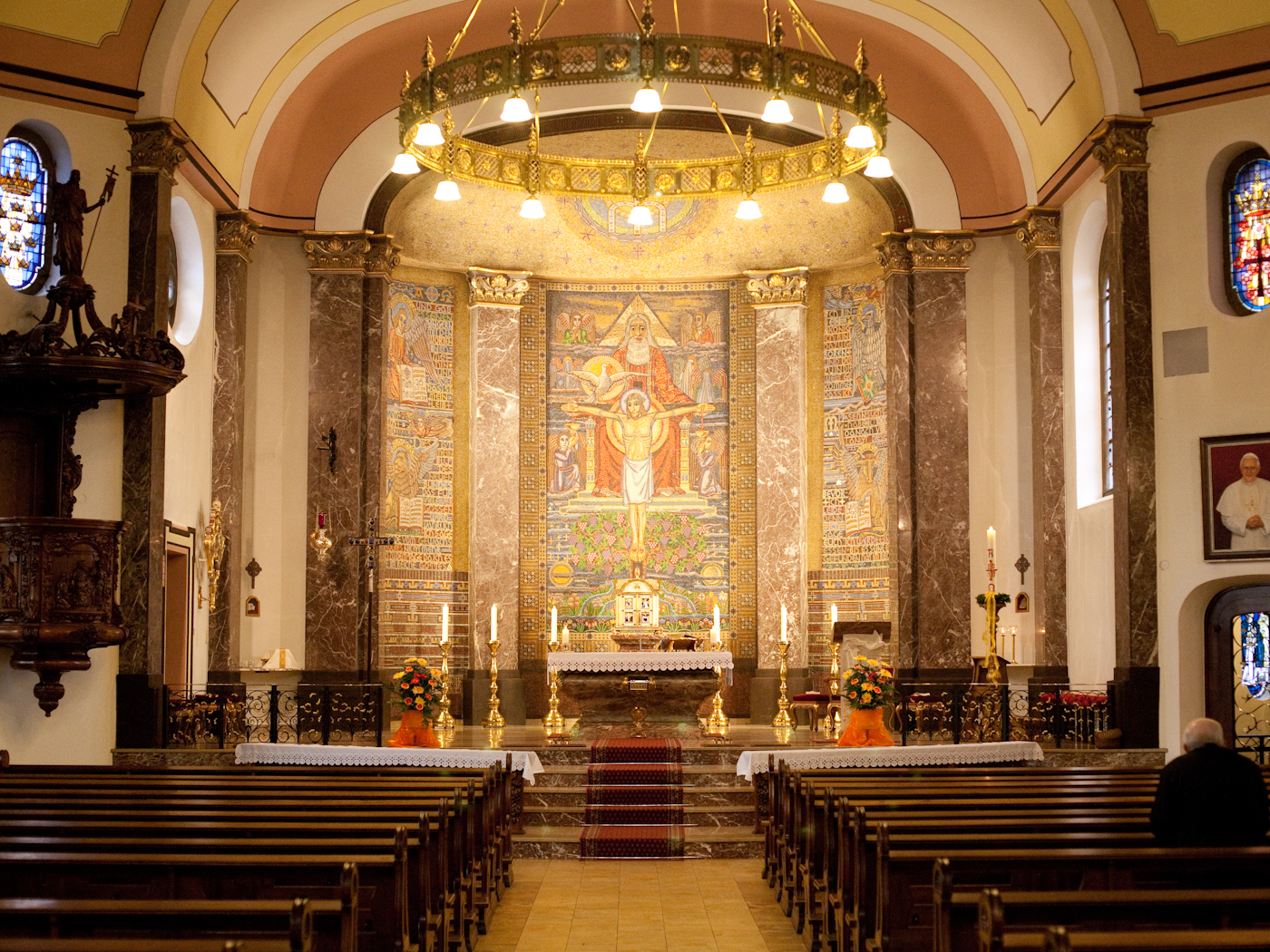 Innenraum der Basilika von Bethen